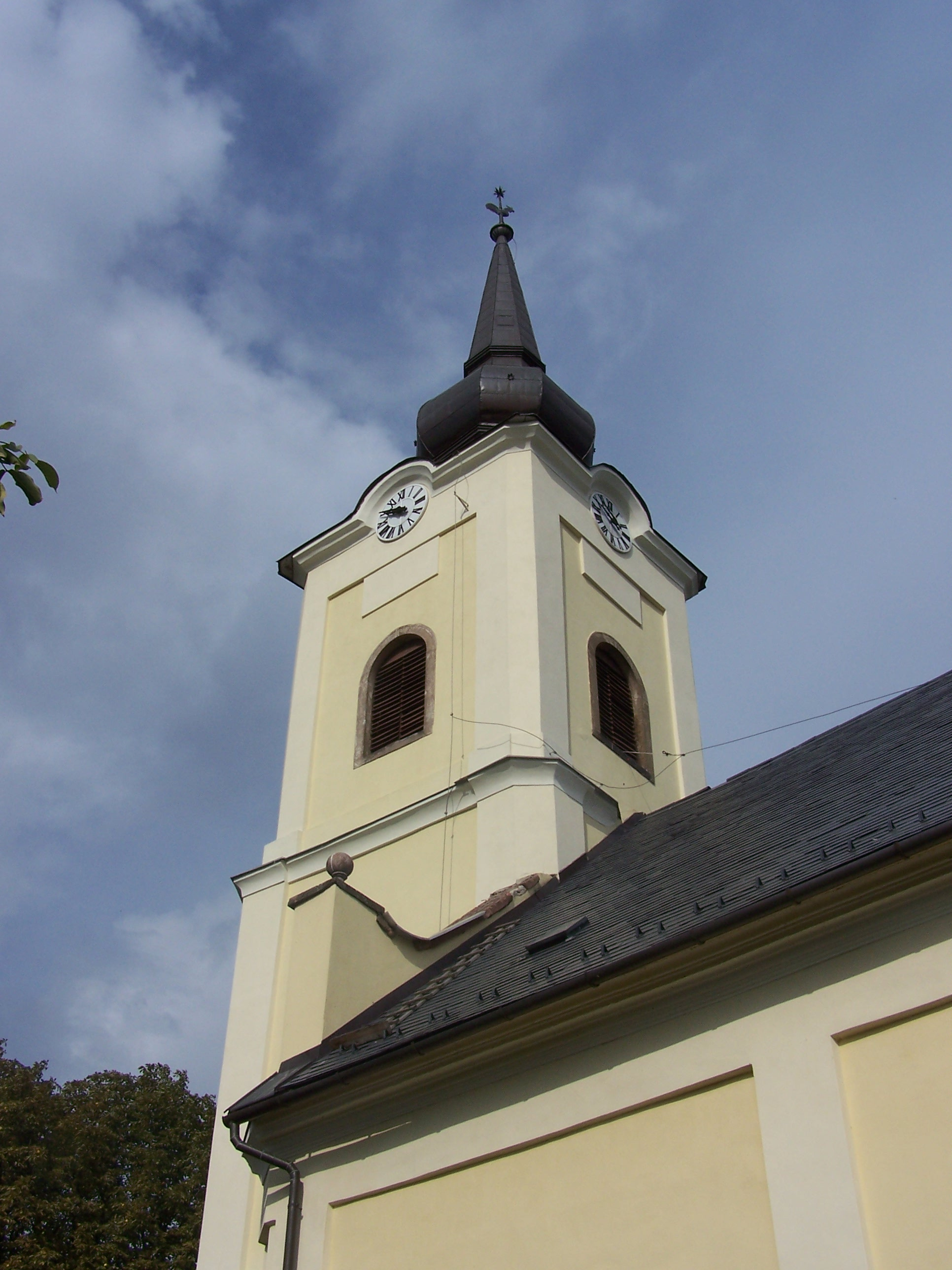 Református templom (Mezőnagymihály, Kossuth u. 95.) This is a photo of a monument in Hungary. Identifier: 2917